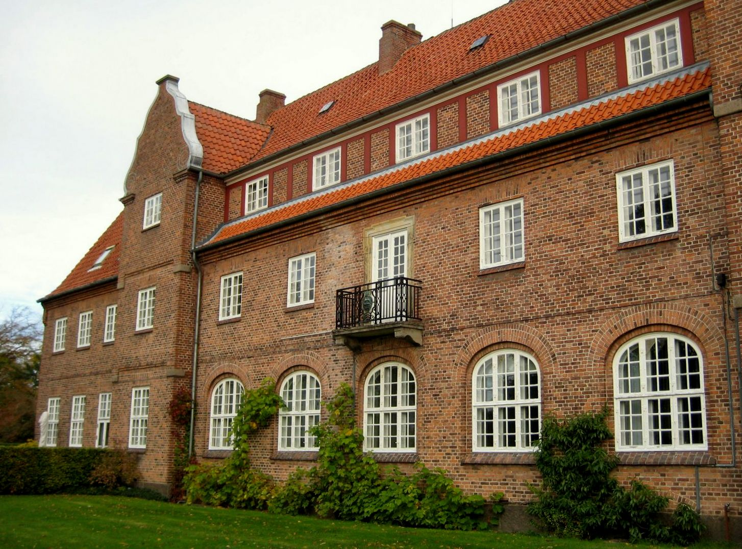 Hovedfløjen i administrationsbygningen. Set fra haven / bagsiden.